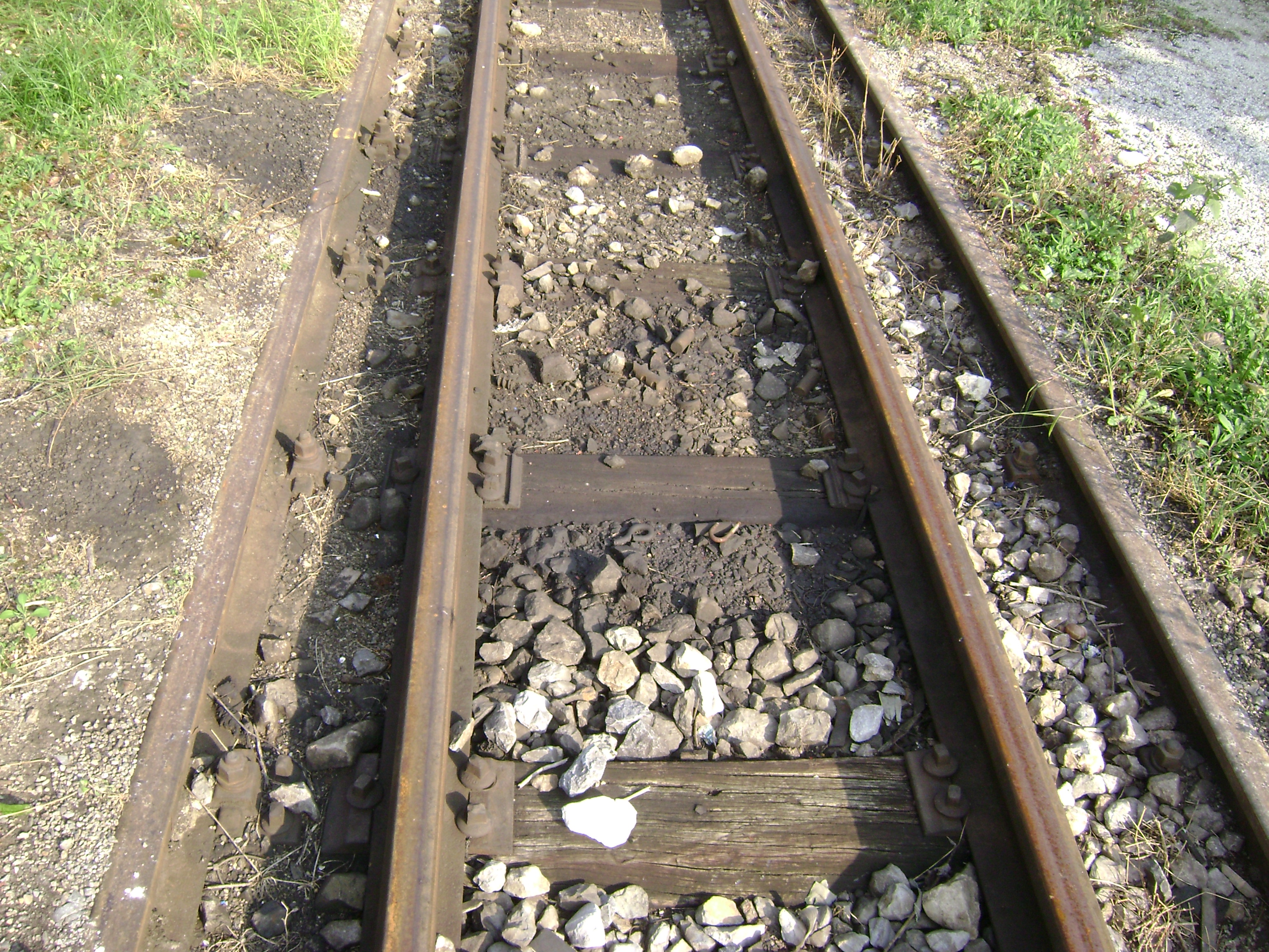 Kolosjek uskotračne željeznice od 760mm unutar normalnog kolosjeka od 1435 mm u Željezničkom muzeju u Ljubljani, Slovenija